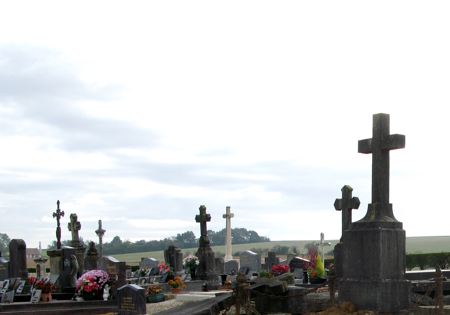 Pontru (Aisne, France) - Partie droite du cimetière, après l'entrée. Des tombes de soldats britanniques sont visibles dans le cimetière (Une plaque apposée à l'entrée le signale.) Ici, on peut apercevoir, parmi les croix dressées sur des tombes de civils, celle du carré militaire, plus claire et de forme très typique. .